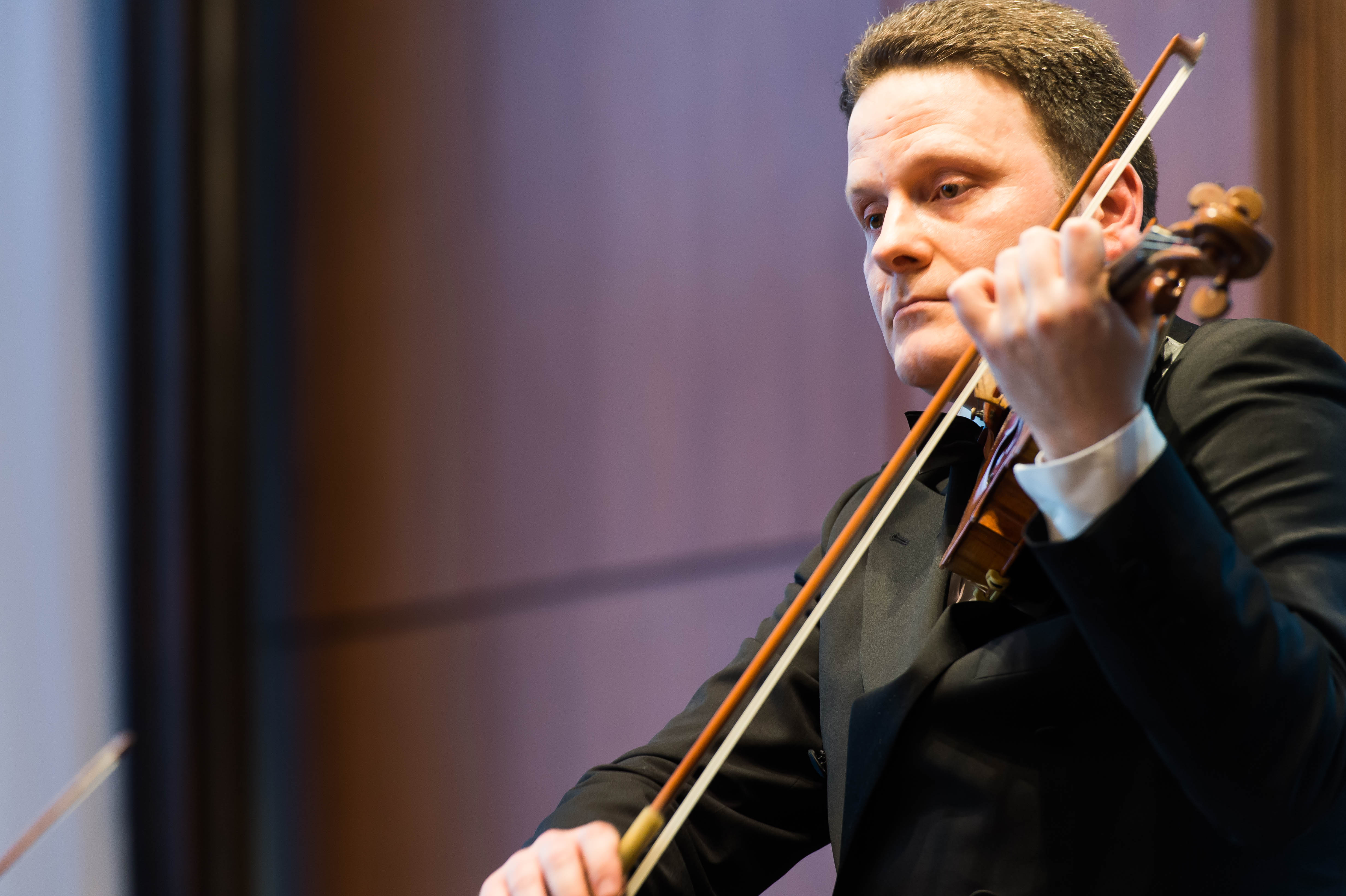 Pengili - Paganini - Bach